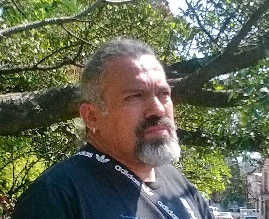 Gerardo Horacio Porcayo en el Jardín Borda en febrero de 2015